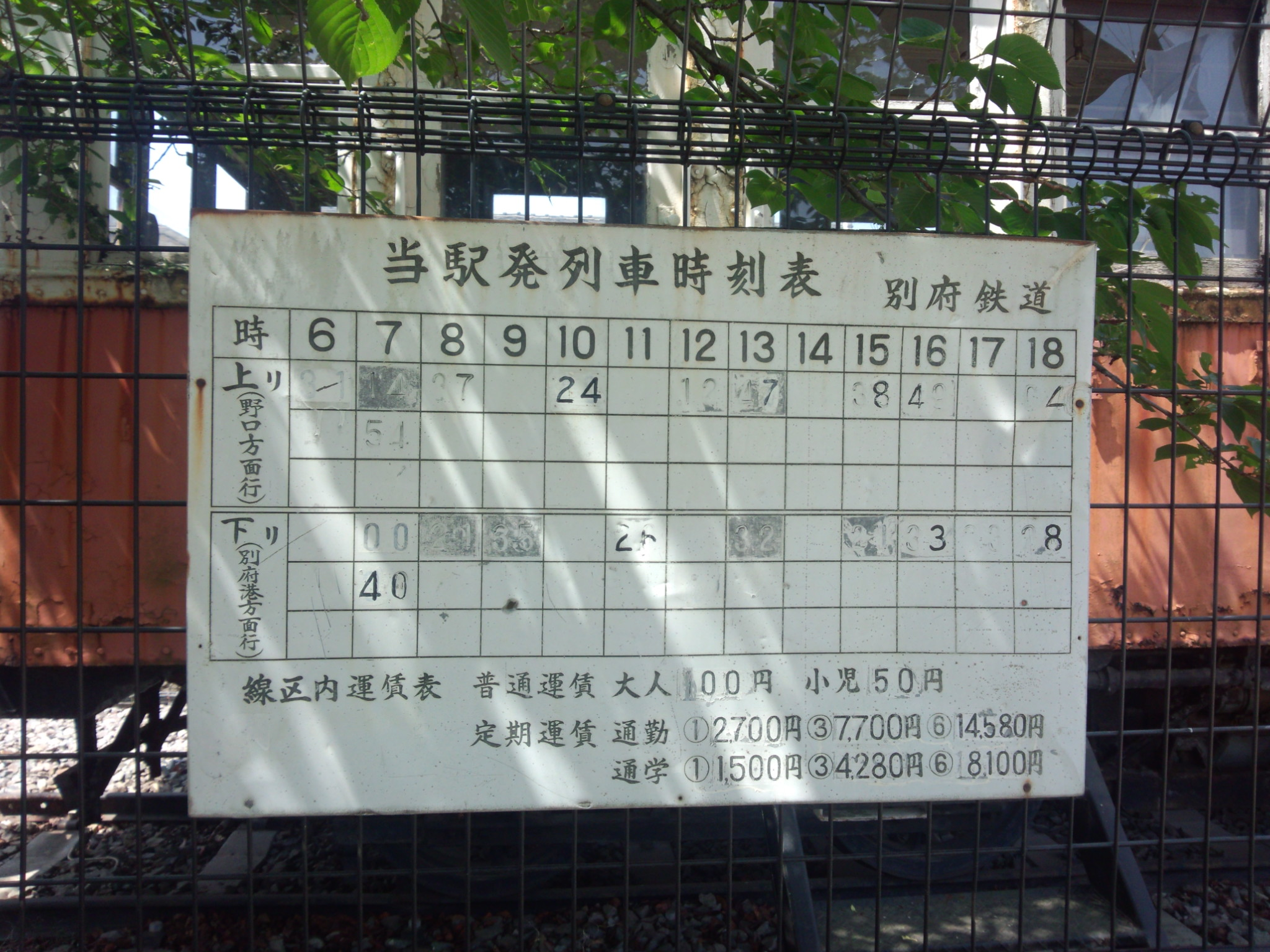 別府鉄道円長寺駅時刻表